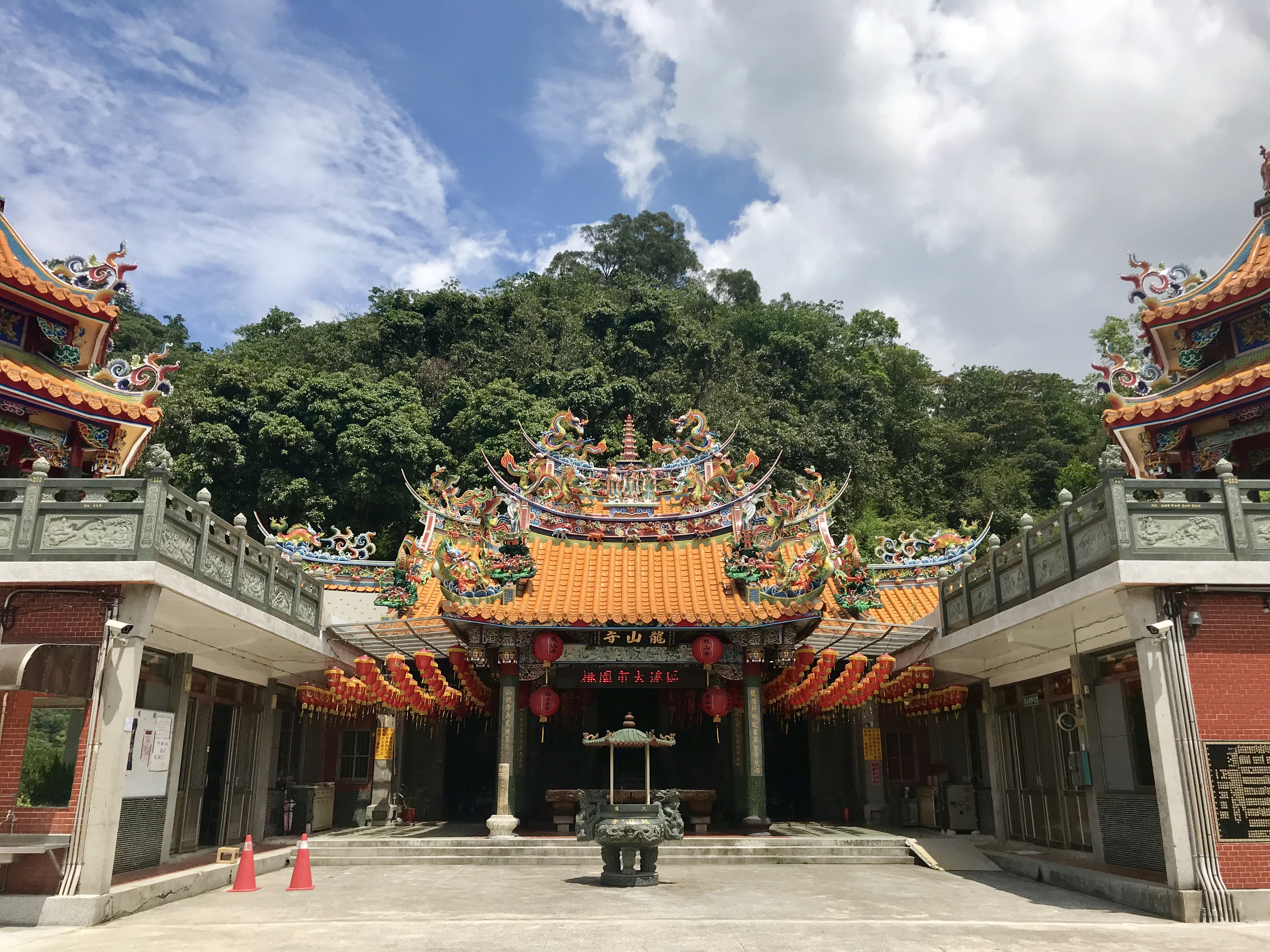 中文（台灣）: 大溪龍山寺正面近照